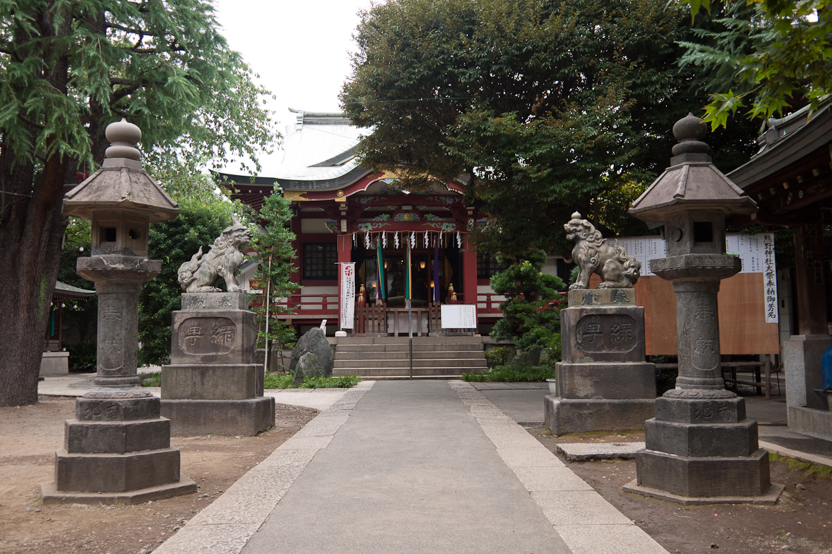 熊野神社、東京都渋谷区神宮前3丁目。